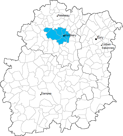 Carte de situation du canton de Montlhéry en Essonne (91)